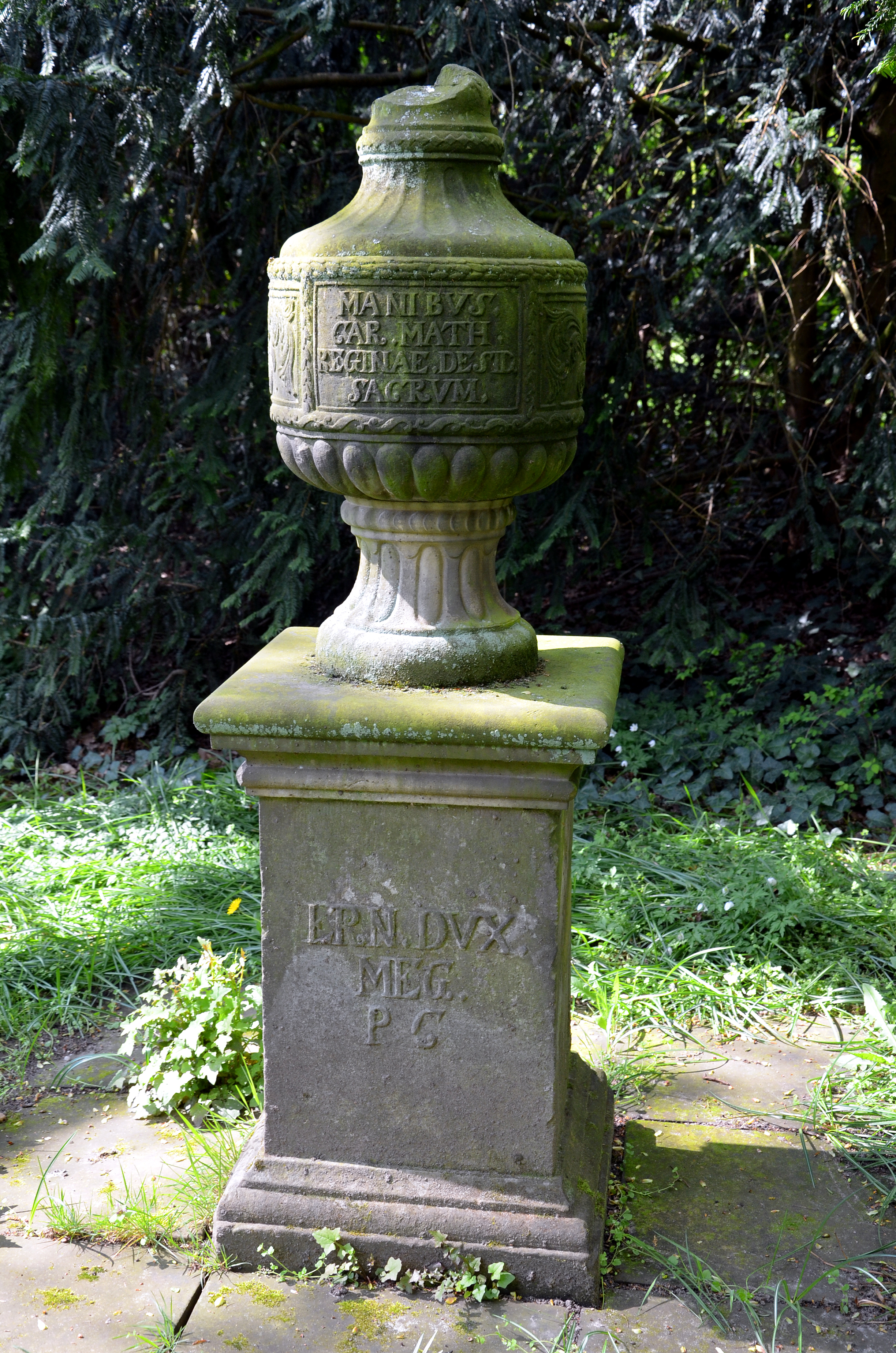 Das Denkmal für Königin Caroline Mathilde von Dänemark ließ Prinz Ernst von Mecklenburg-Strelitz 1775 im Park seines Palais Mecklenburg in Celle aufstellen ...